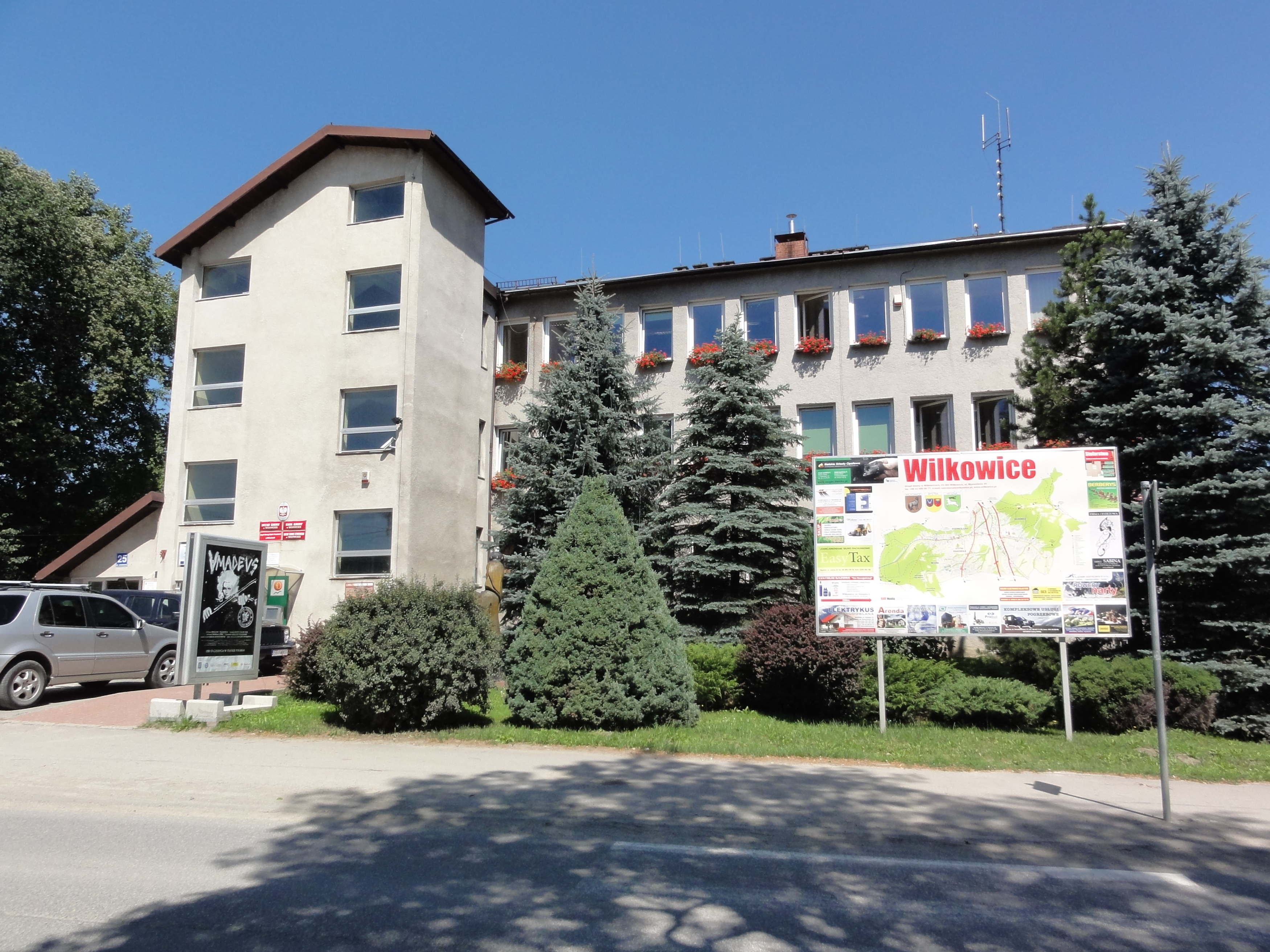 Urząd Gminy w Wilkowicach